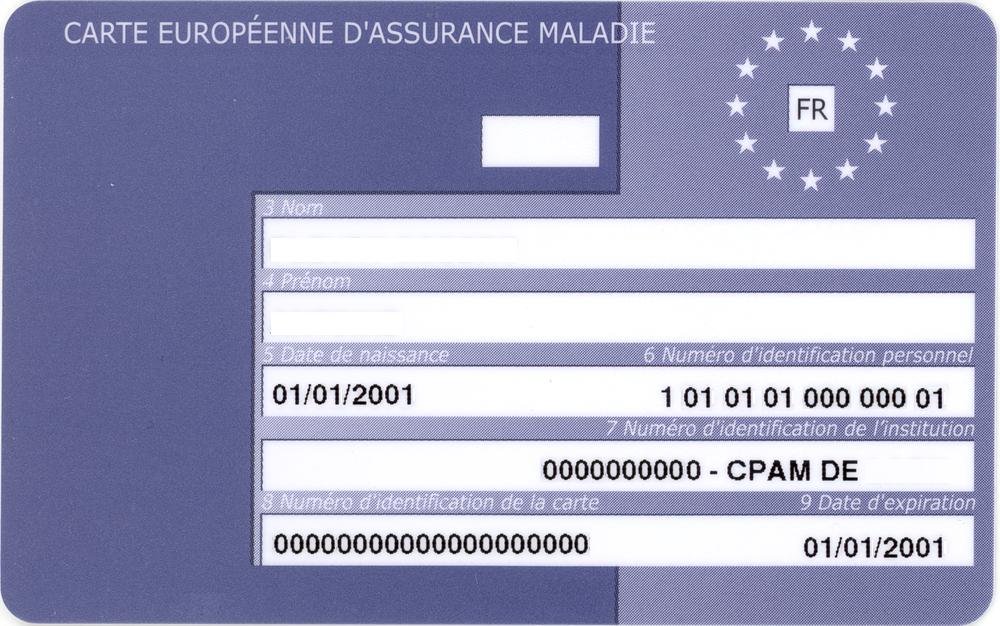 Carte Européenne d'Assurance Maladie, version française.